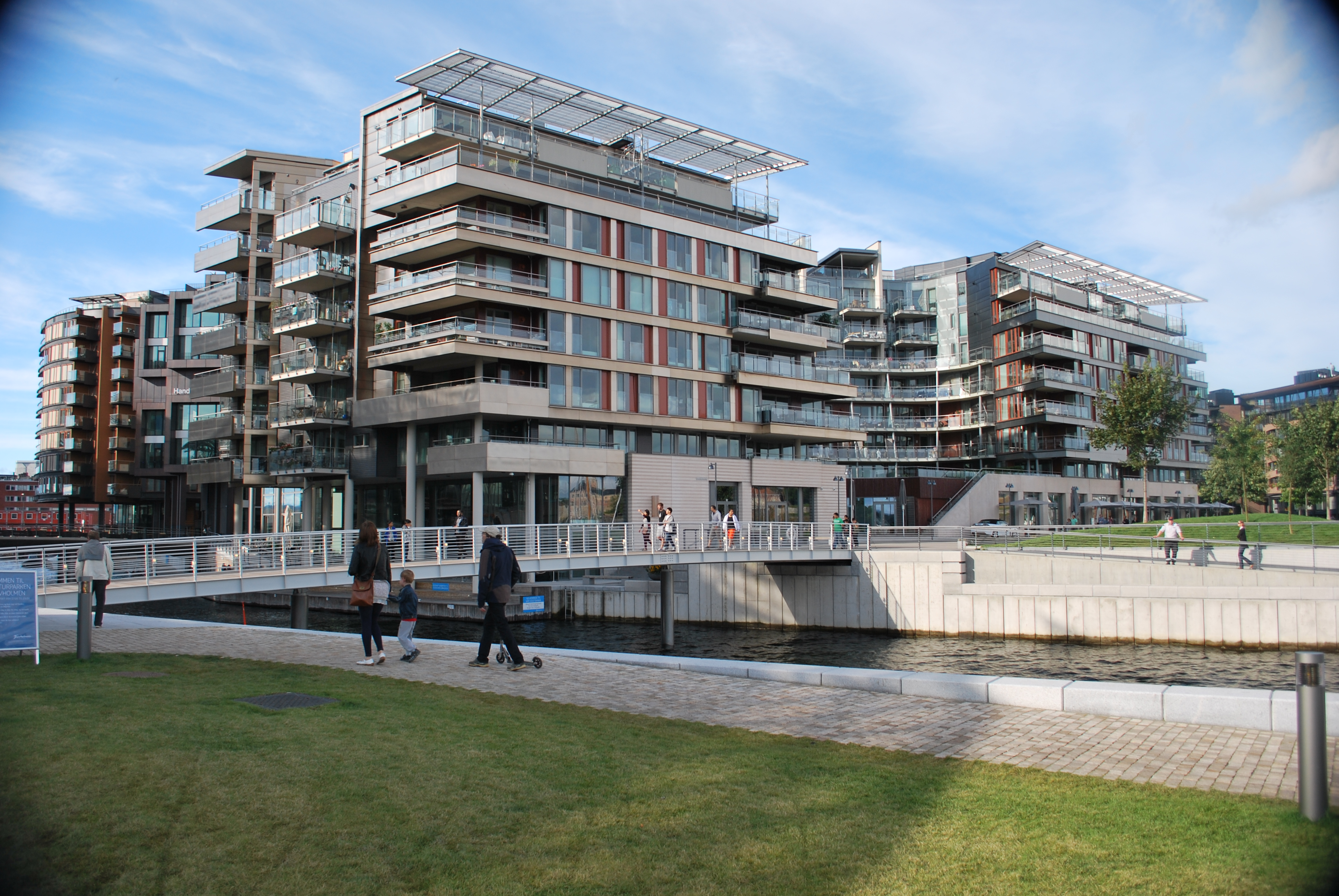 Bebyggelsen ved Strandpromenaden på Odden, sett fra Skjæret, Tjuvholmen, Oslo